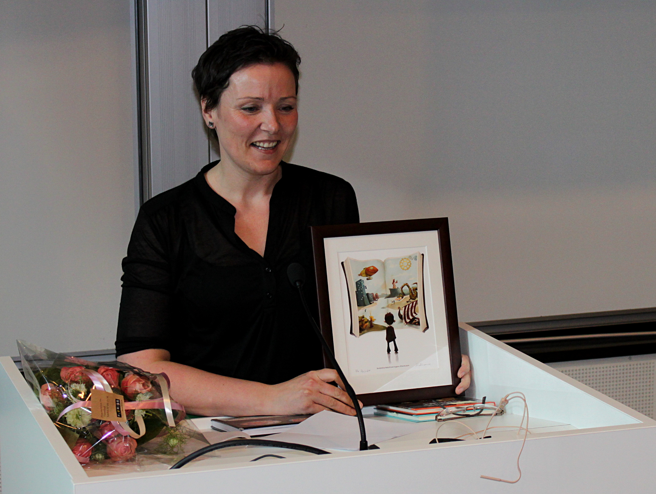 Forfatteren Linn T. Sunne med Skolebibliotekarforeningens litteraturpris under barnebokfestivalen i Grimstad 2012.